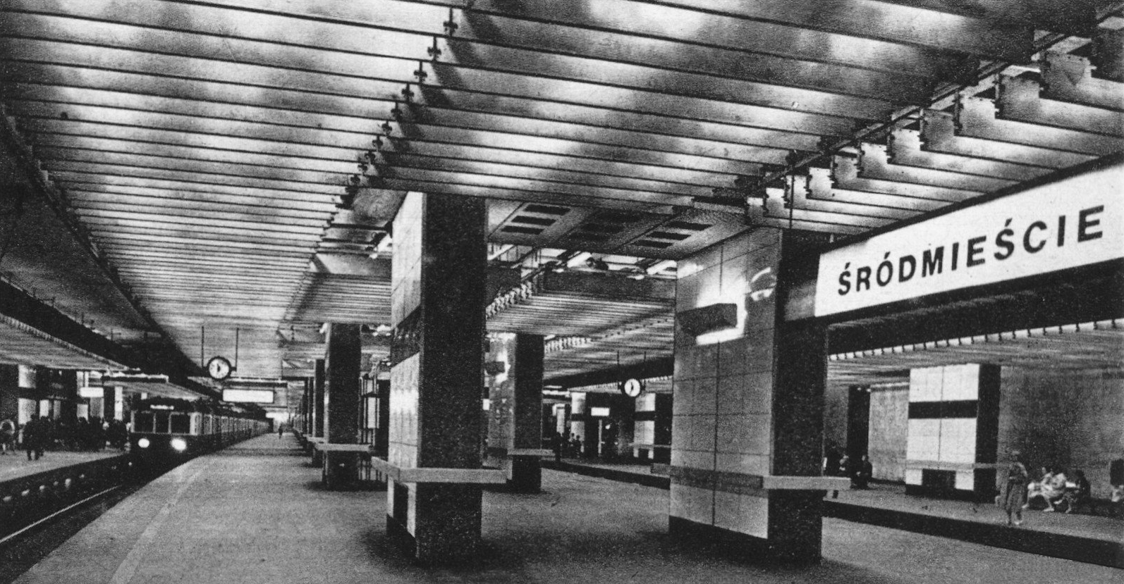 Peron 2 przystanku kolejowego Warszawa Śródmieście, 1968.